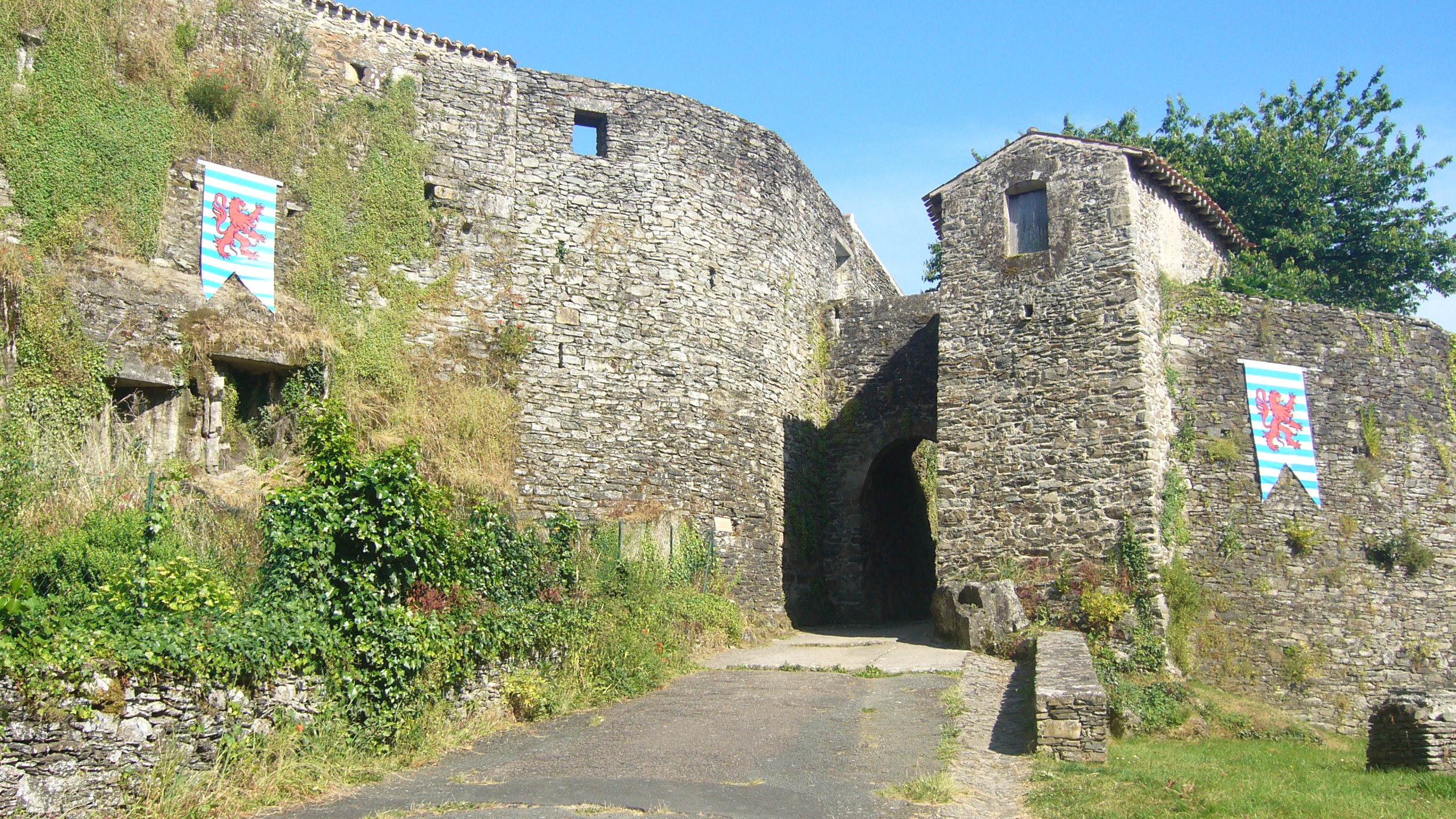 La Poterne (Porte Saint-Louis)